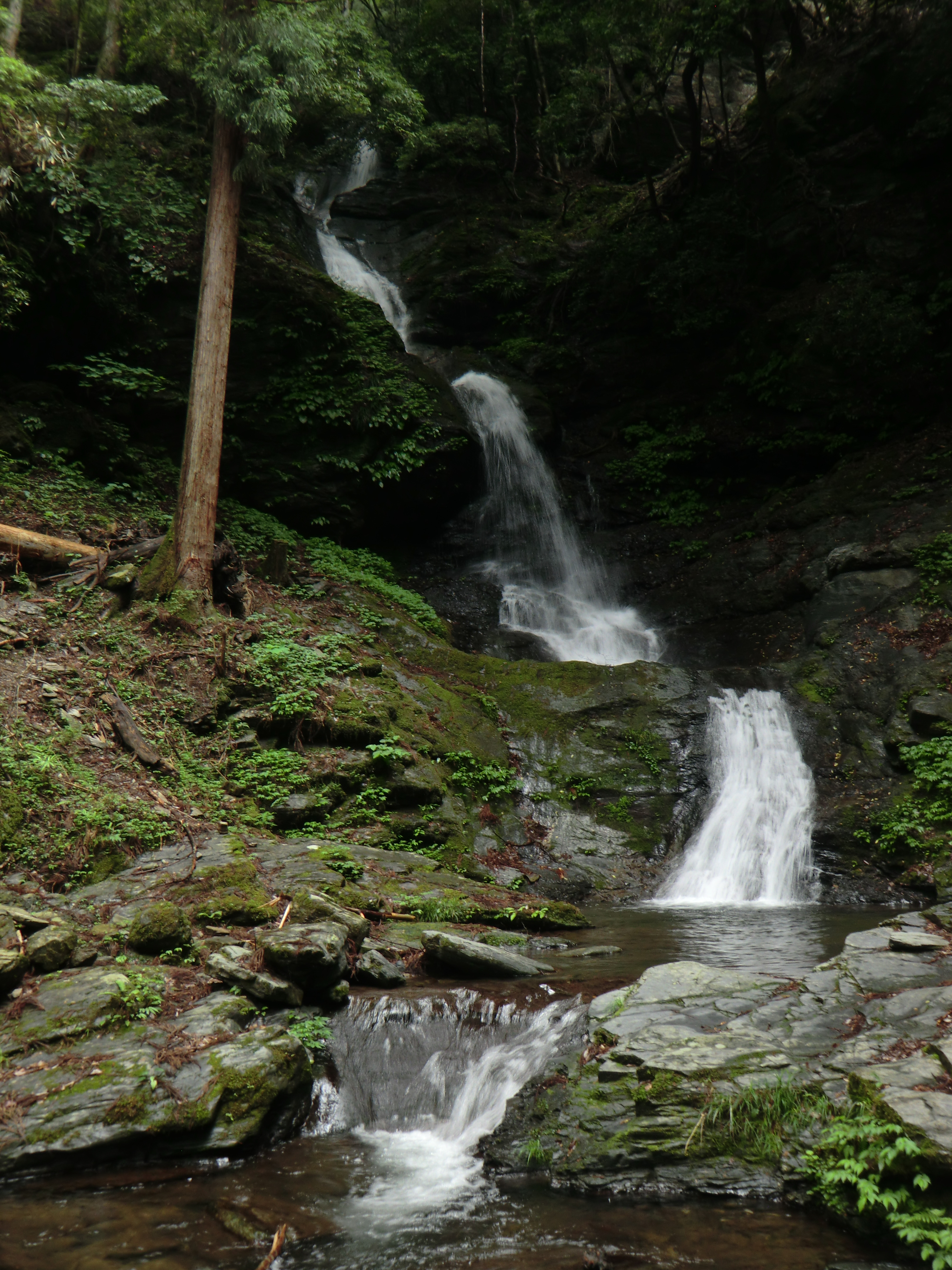 七滝八壺 (東吉野村大又・2018年6月)